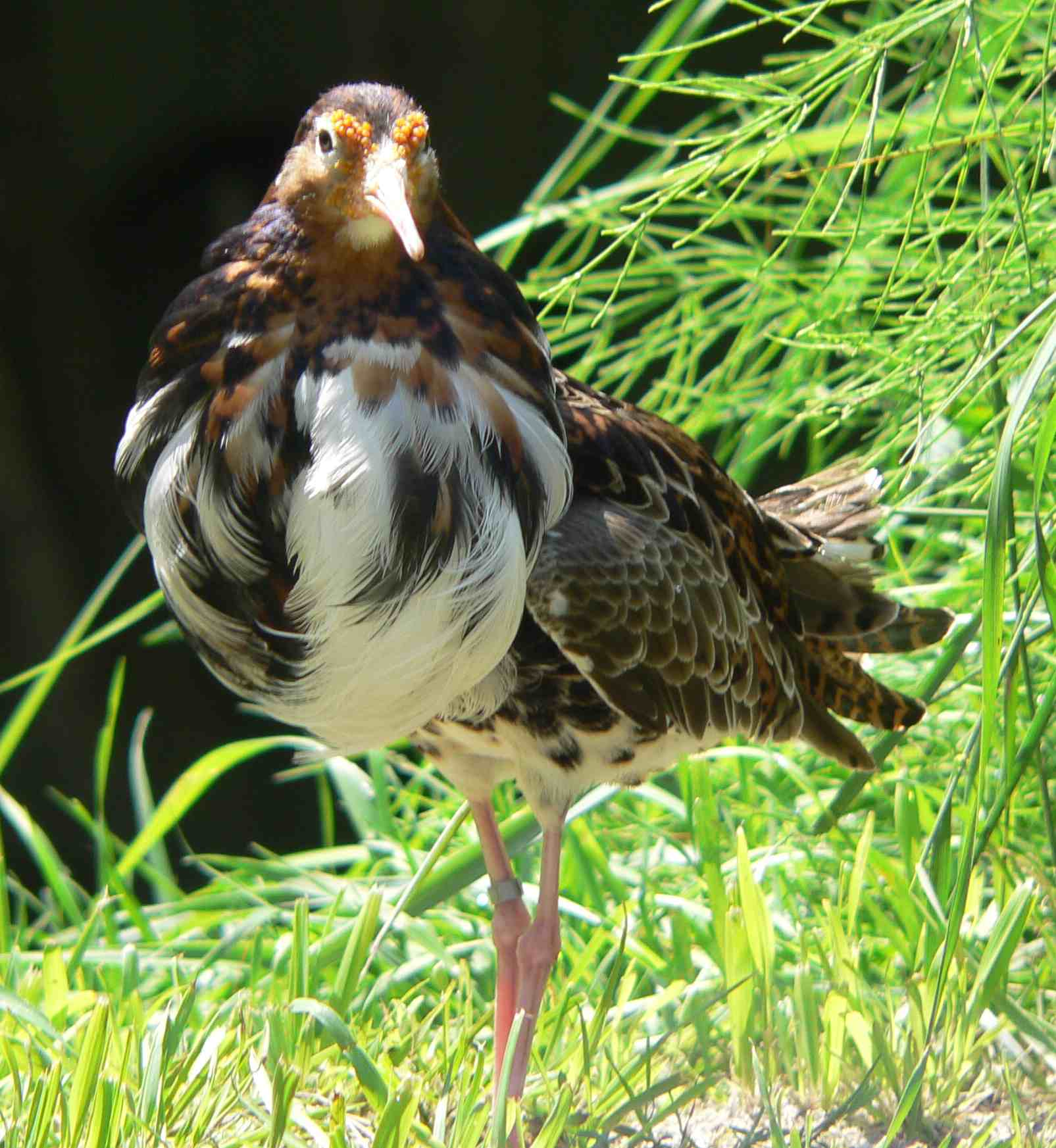 bird